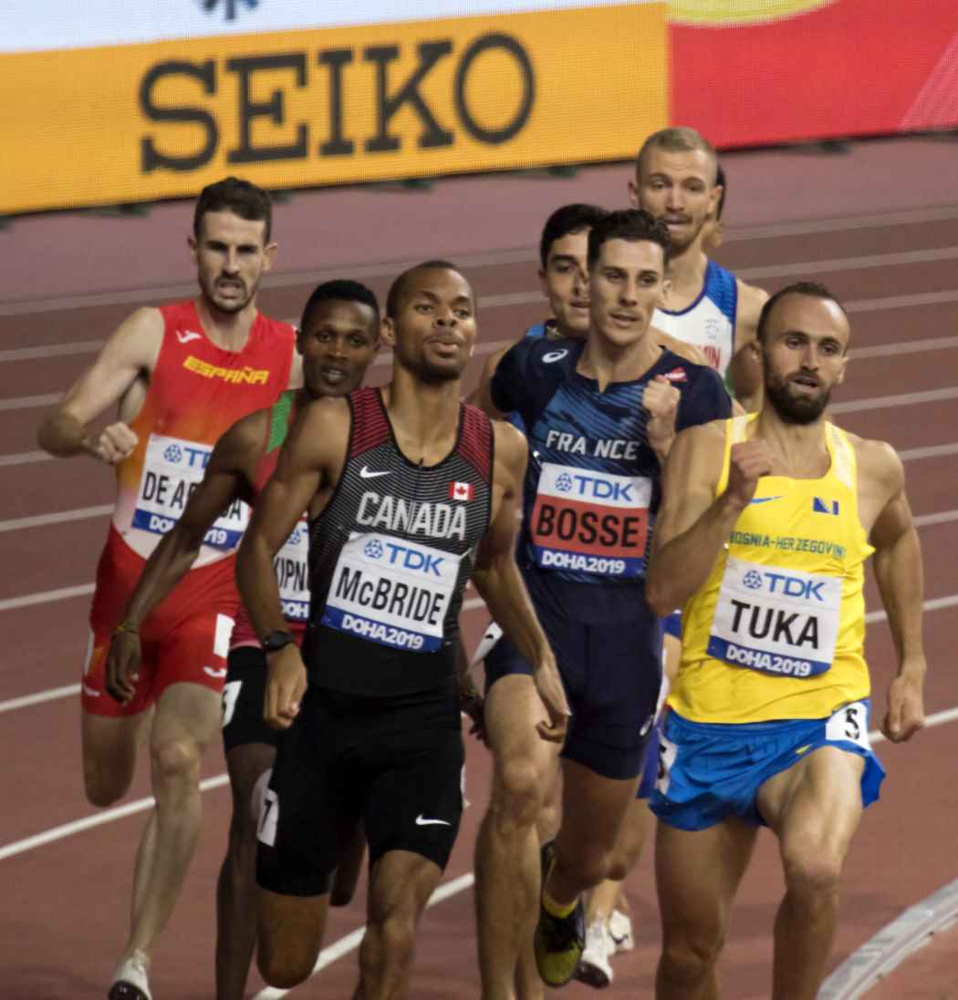 DOH30116 800m men semifinal